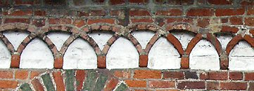 Kreuzbogenfries(Kirche Haseldorf), Foto 2002